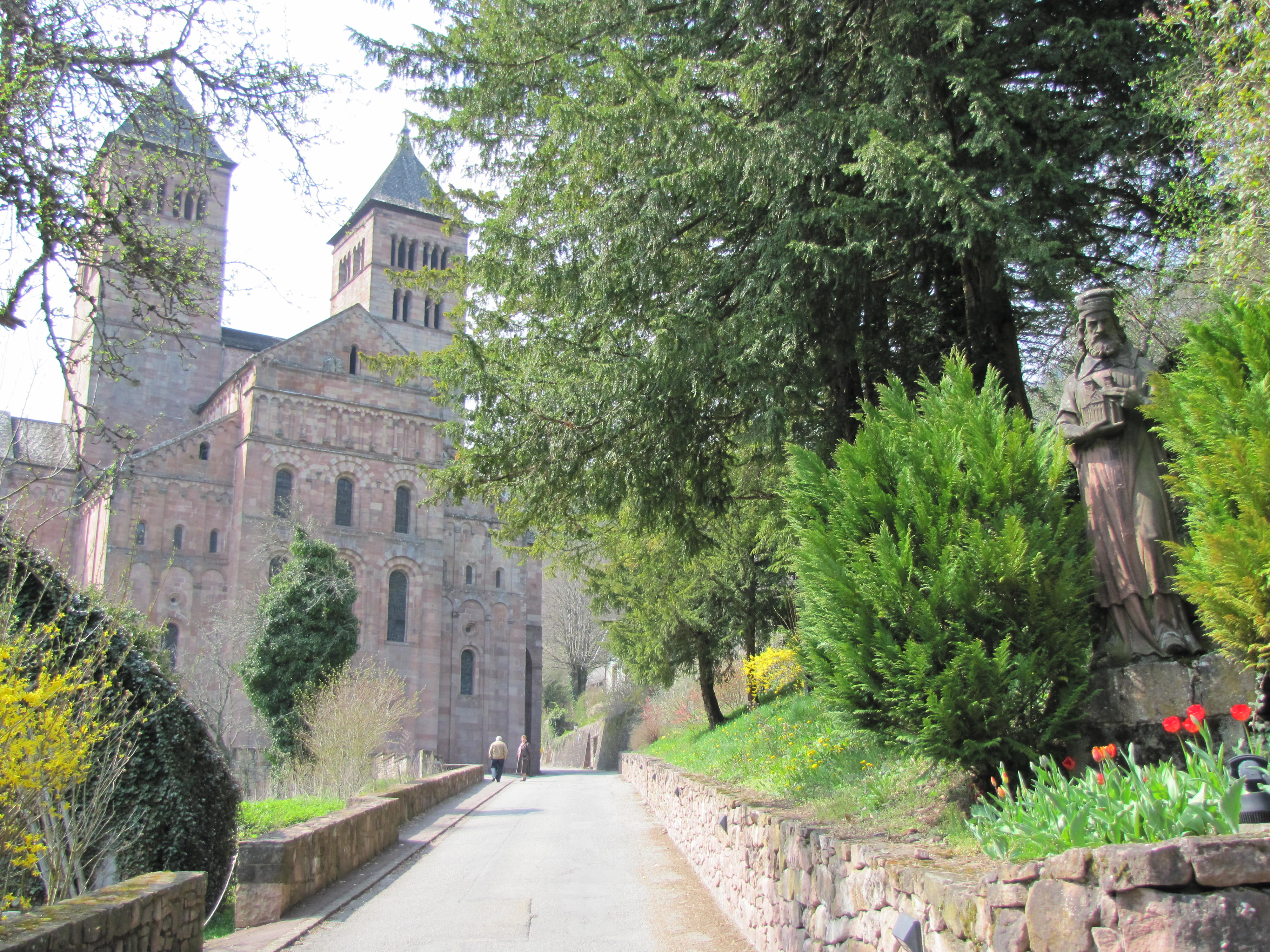 Alsace, Haut-Rhin, Église abbatiale Saint-Léger (XIIe) de Murbach (PA00085554, IA00054802, IA00054801).